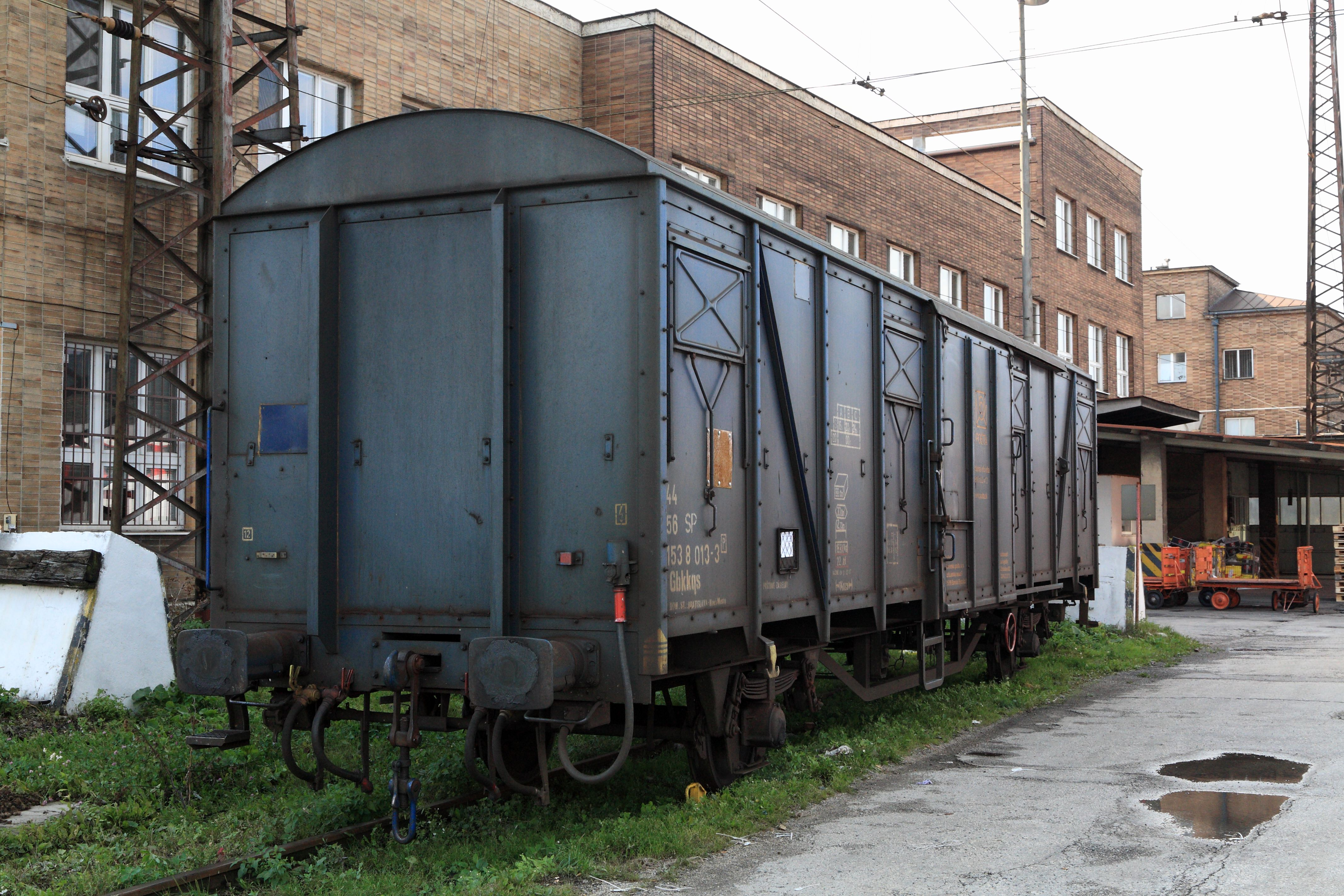 Bf Žilina, Postwagen in Güterwagenbauart mit Hauptluftbehälter- und elektrischer Heizleitung